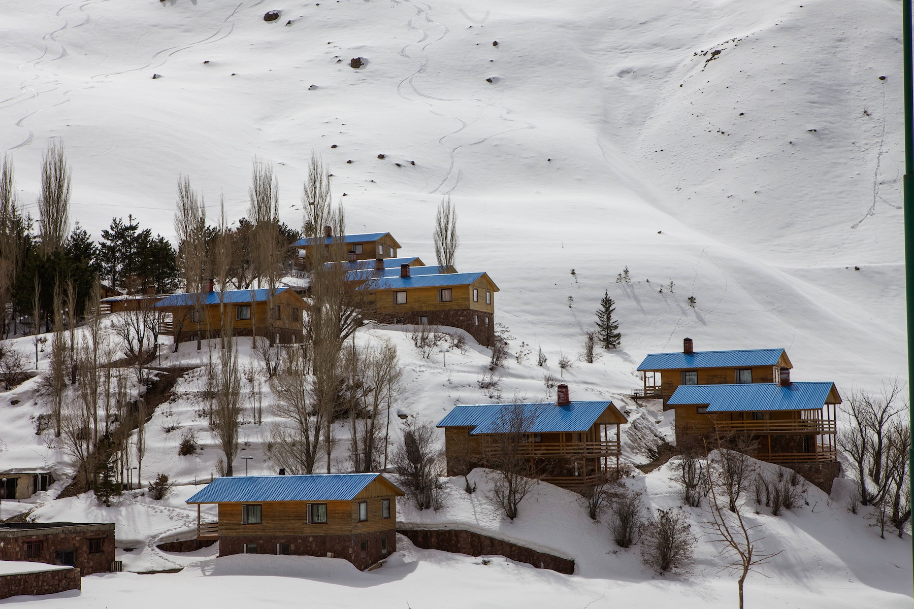 Dizin Ski resort, Alborz Mountains, Tehran, Iran